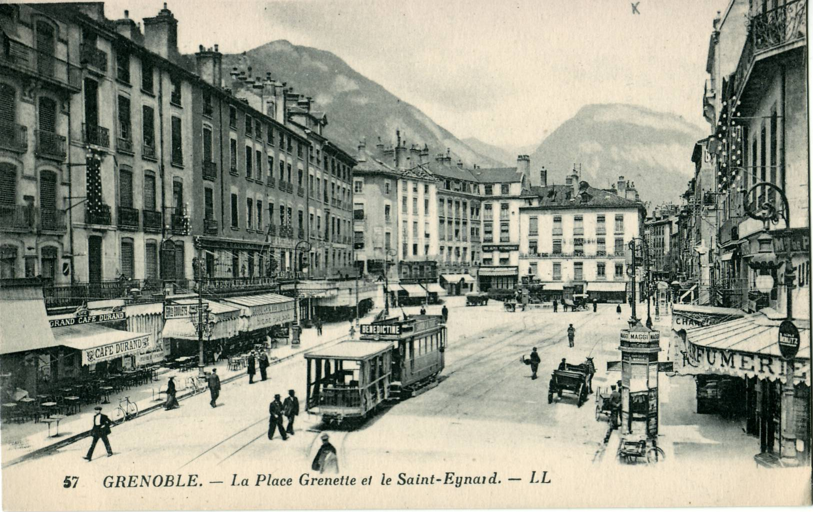 Carte postale éditée par LL N°57 : GRENOBLE : La Place Grenette et le Saint-Eynard